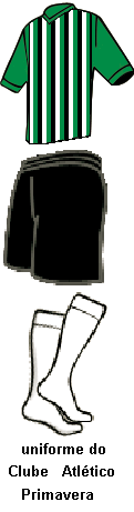 representação do uniforme do Clube Atlético Primavera - Curitiba